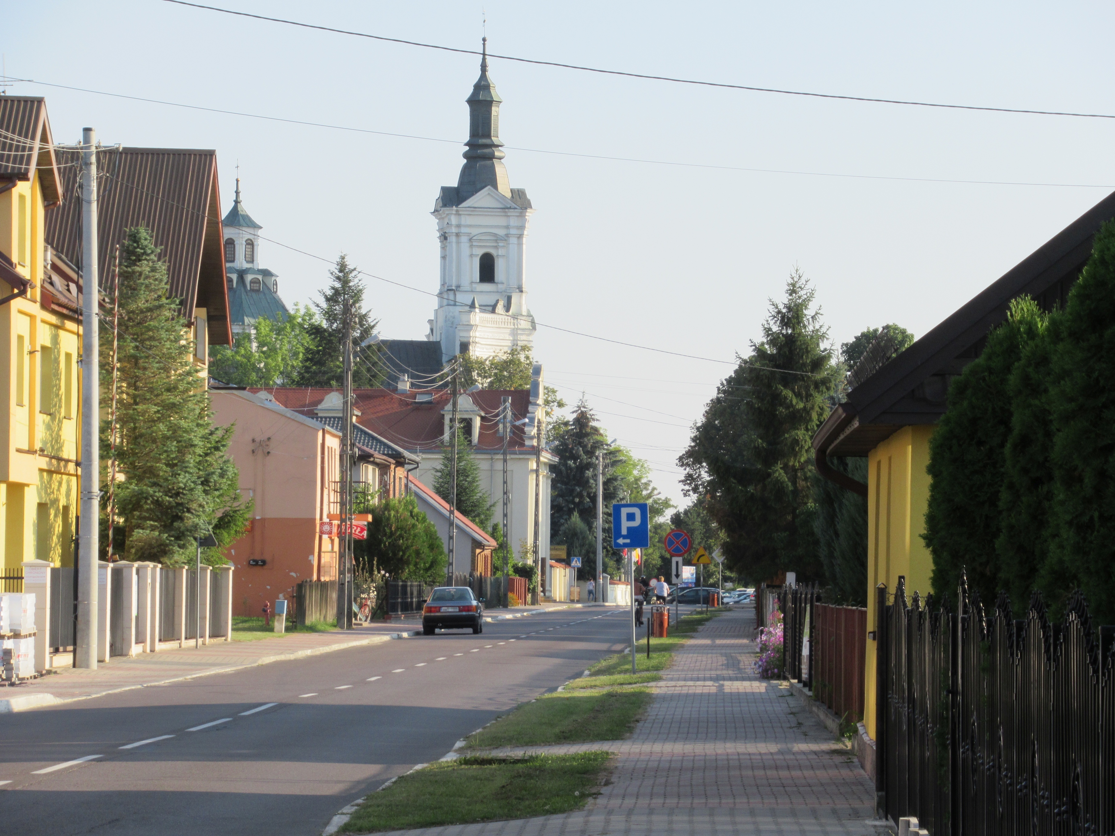 Kodeń (pow. bialski, woj. lubelskie, Polska). Główna ulica miejscowości.